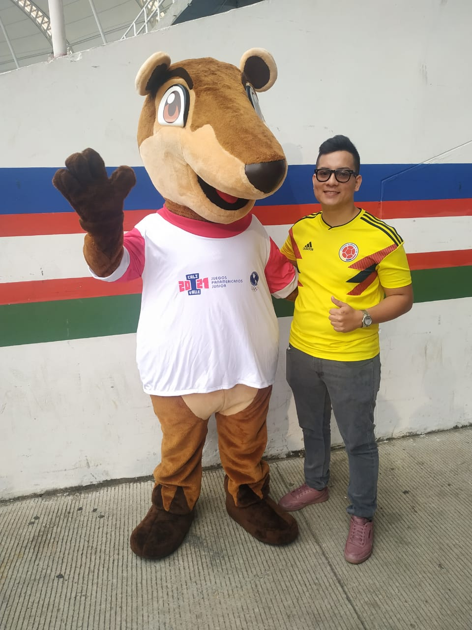 Pana junto a su diseñador, el ganador del concurso para encontrar el personaje oficial de los I Juegos Panamericanos Junior, Brayan Rangel